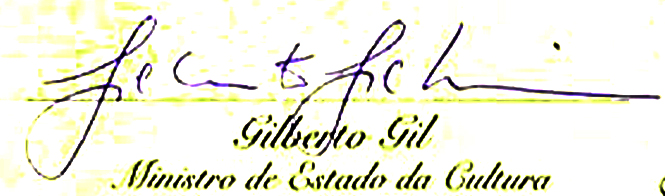 Assinatura do artista Gilberto Gil como Ministro de Estado da Cultura do Brasil